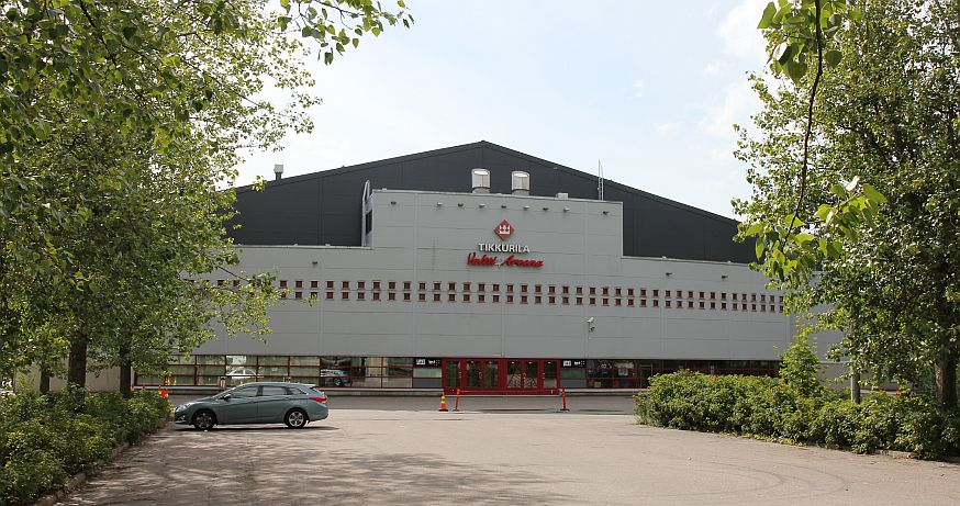 Tikkurilan urheilupuiston (Viertola) Valtti Areena eli Tikkurilan jäähalli. Hallin vieressä on harjoitushalli (kuvasta oikelle). Toisella puolella sijaitsee Tikkurilan urheilutalo ja Tikkurilan uimahalli. Huom: Muista säilyttää viittaus kuvaajaan, mikäli käytät kuvaa.